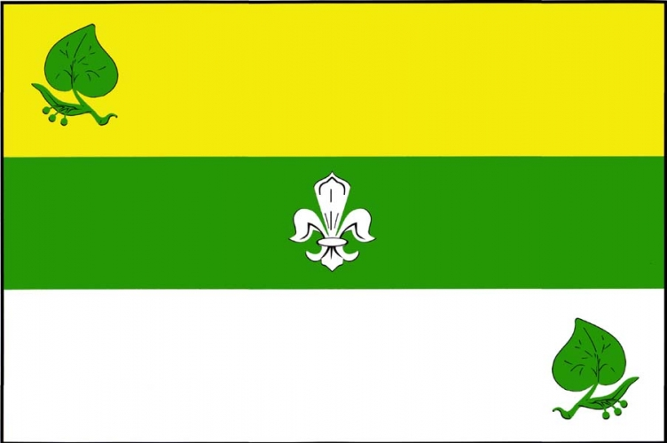 Vlajka, Příluka, okres Svitavy